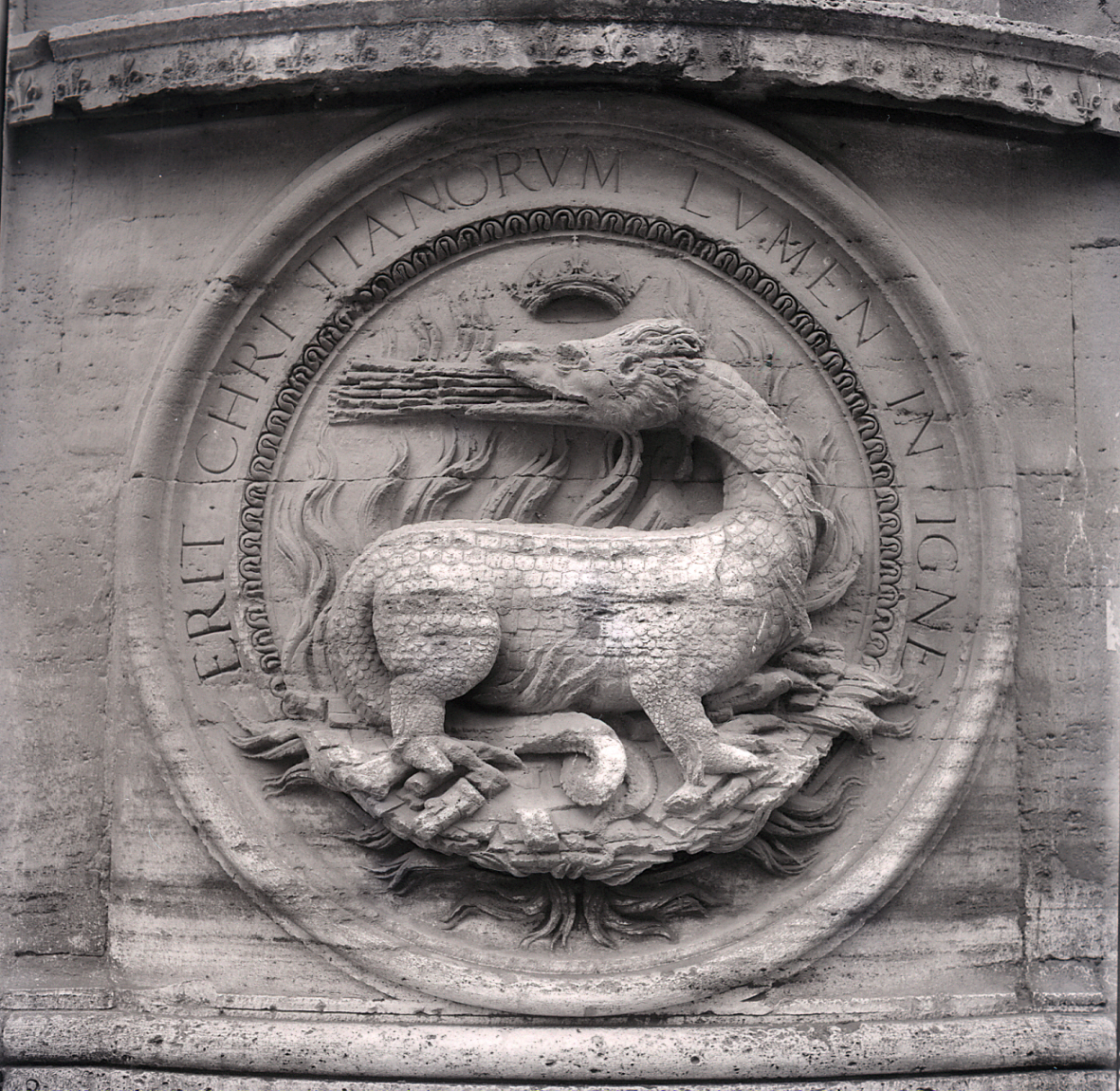 Servizio fotografico : Roma, 1960 / Paolo Monti. - Buste: 22, Fototipi: 22 : Negativo b/n, gelatina bromuro d'argento/ pellicola ; 6x6. - ((Serie costituita da 22 negativi identificati con i nn.: 9931-9952. Numerazione parallela: 242-263. La suddetta serie è contenuta nella scatola identificata con la numerazione R9871/10253. Sul coperchio iscrizione manoscritta a pennarello: "Roma (2)".